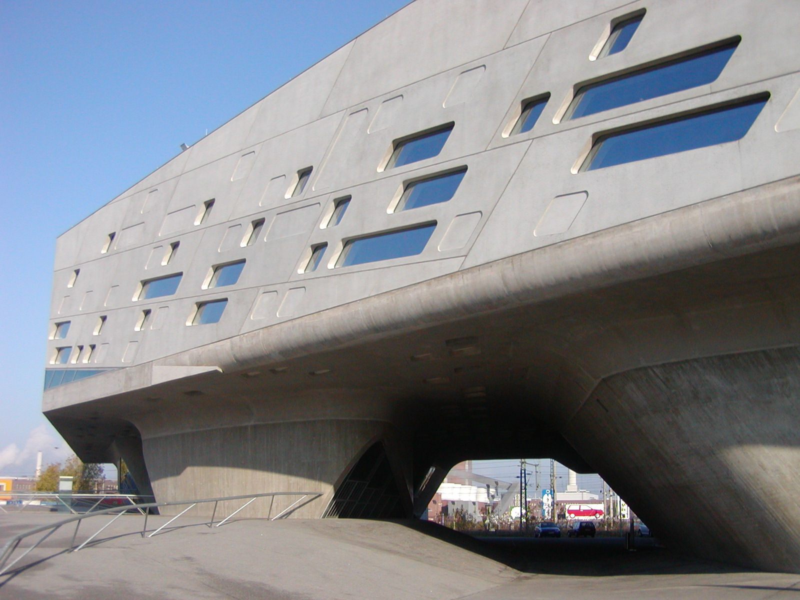 Phaeno Wolfsburg